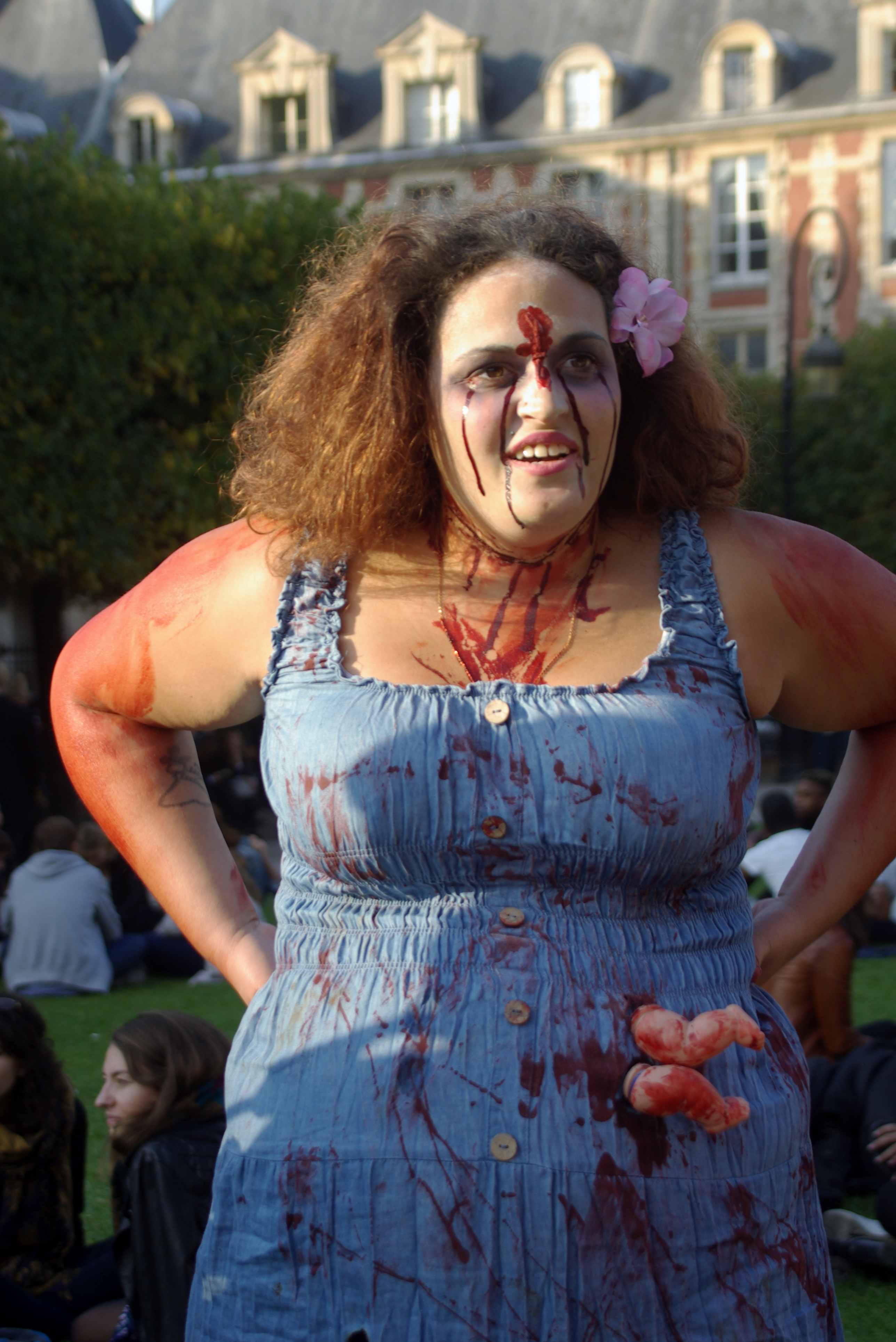 Zombies en la Plaza de los Vosgos, Les Marais, París